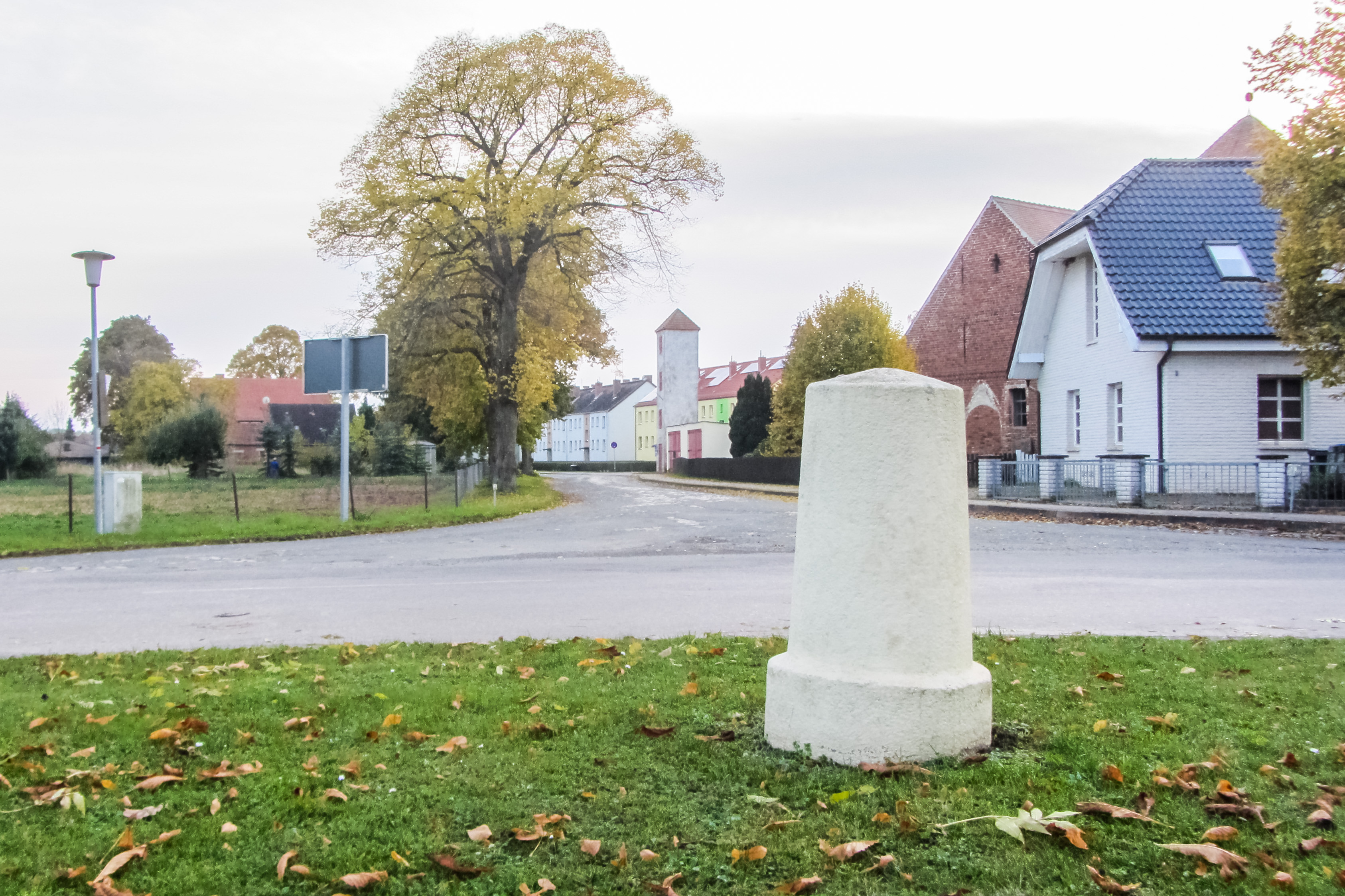 Preußischer Rundsockelstein, an der B 190 gegenüber dem Abzweig K1019 nach Lichterfelde in Altmärkische Wische OT Wendemark